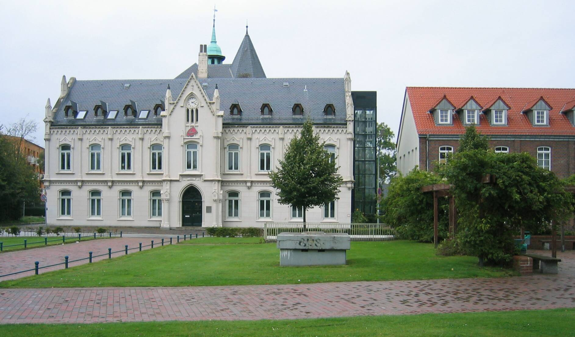 Lehe: Altes Rathaus (rechts anschließend: Zwingli-Schule) am alten Leher Markt Das abgebildete Objekt ist ein geschütztes Kulturdenkmal in der Freien Hansestadt Bremen, mit der Nr. 1558 beim Landesamt für Denkmalpflege registriert.